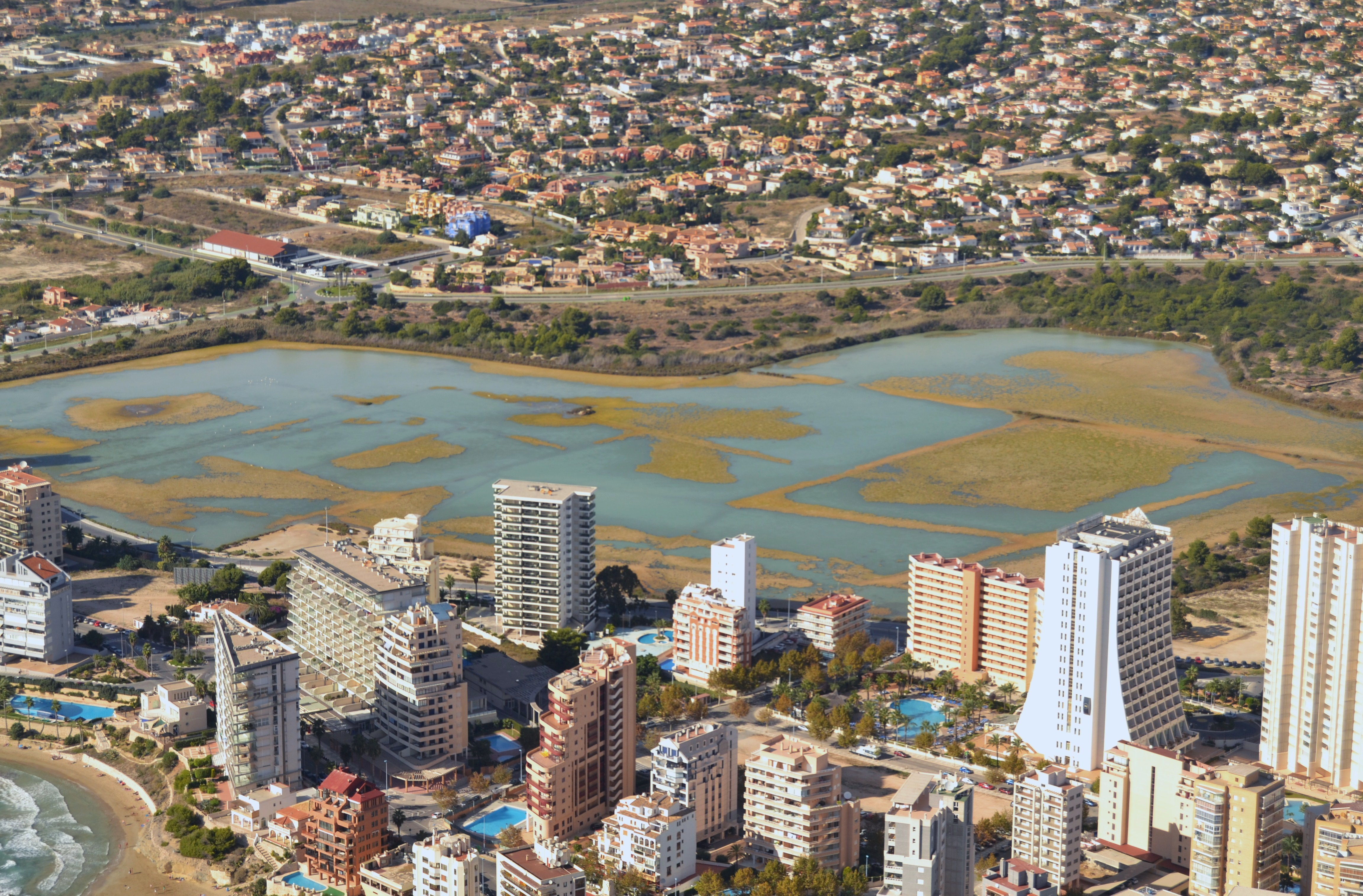 Les salines de Calp vistes des del penyal d'Ifac.